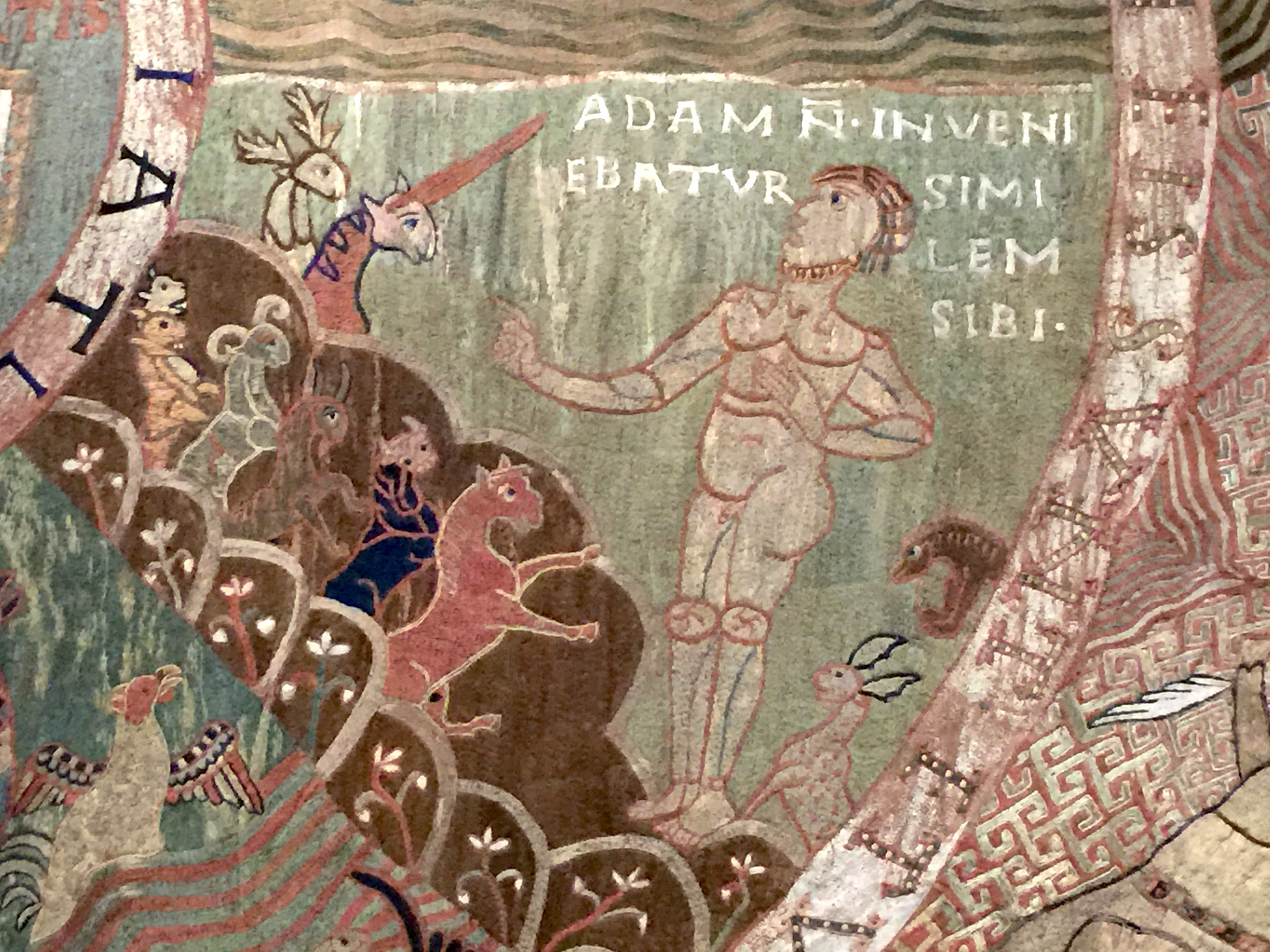 "Adam non inveniebatur similem sibi" ("Adam ne trouvait pas d'animal semblable à lui"). Extrait de la Genèse.